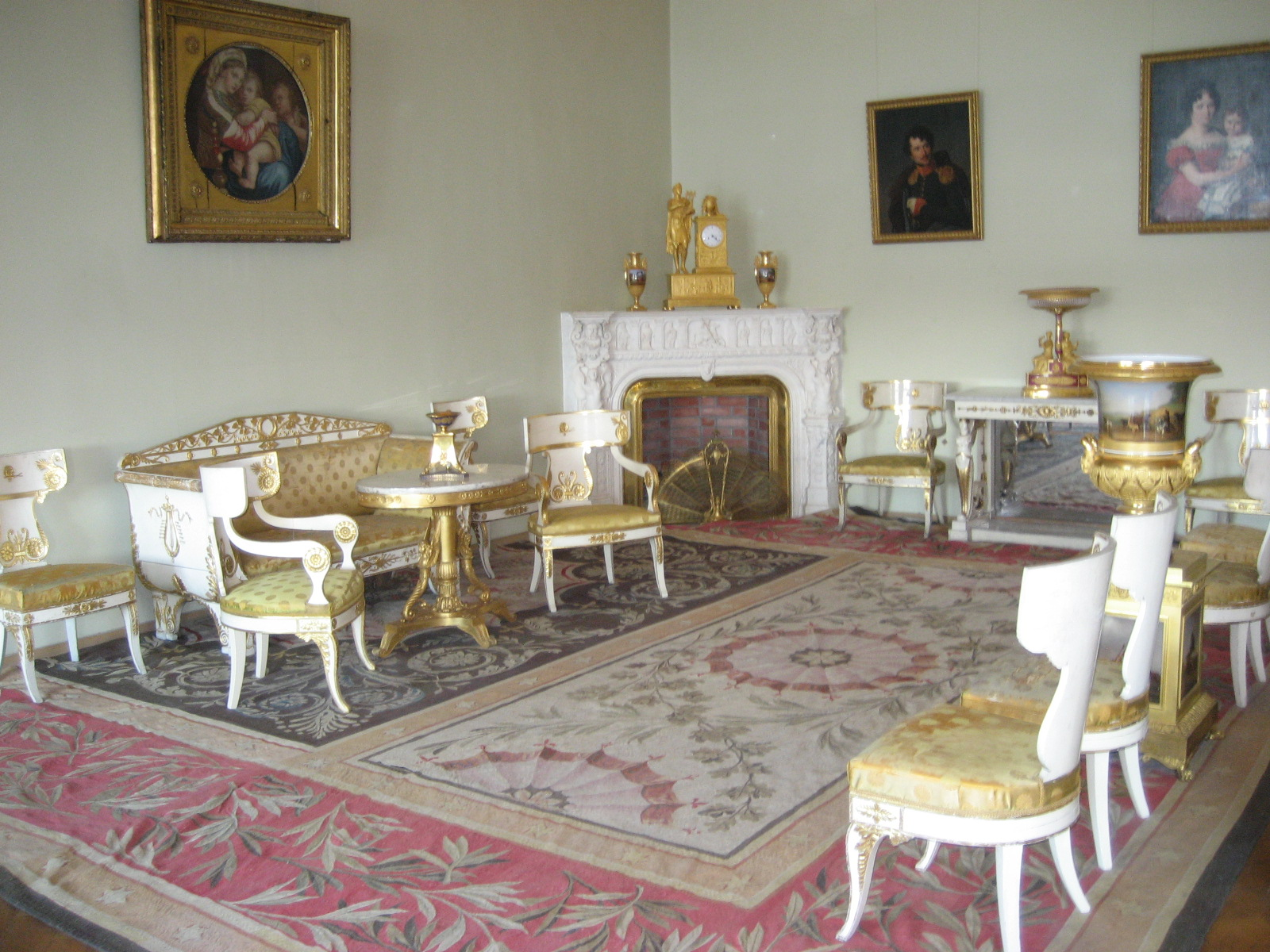 Winter Palace, Saint Petersburg